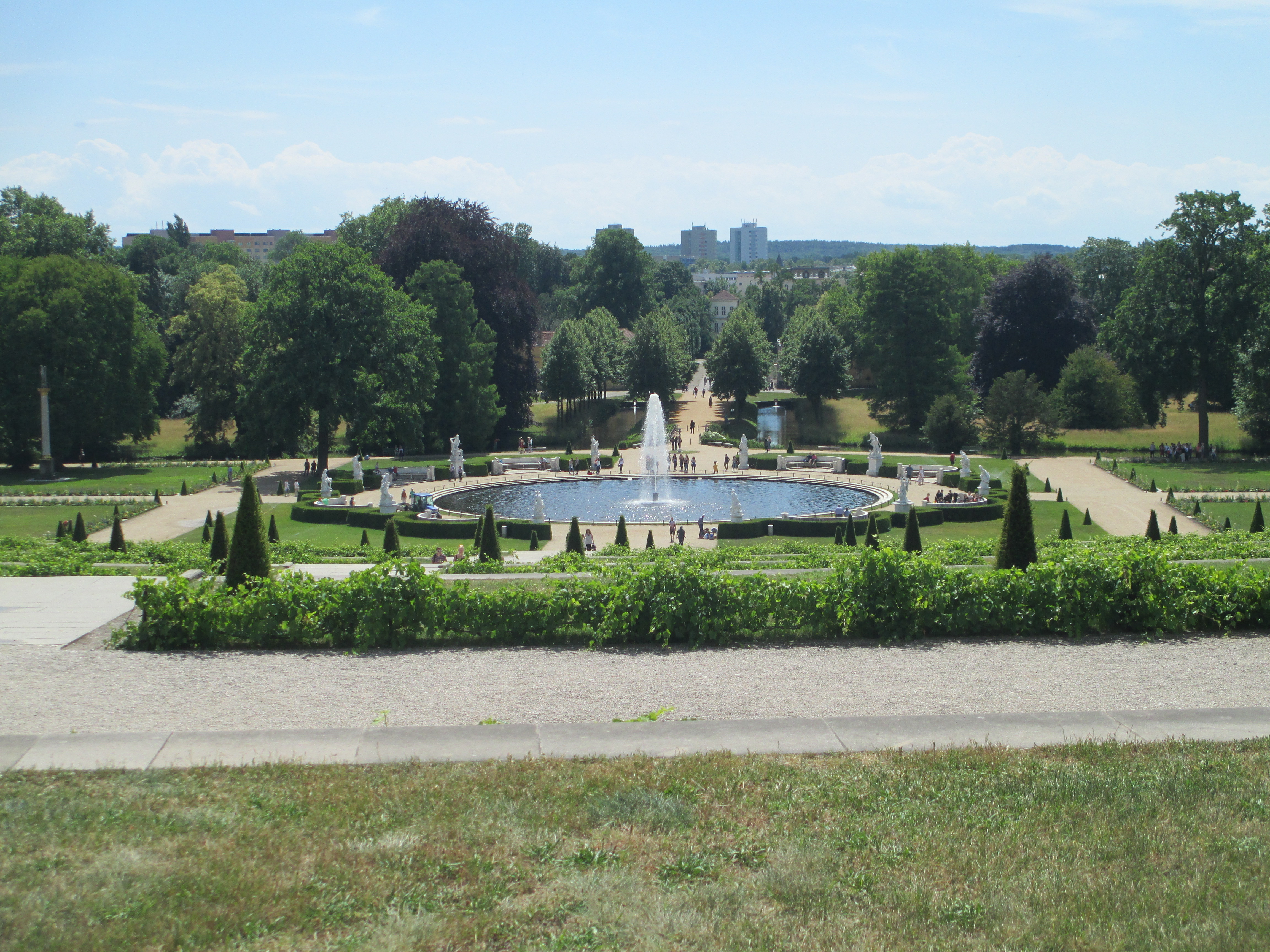 המזרקה הגדולה בגני סנסוסי